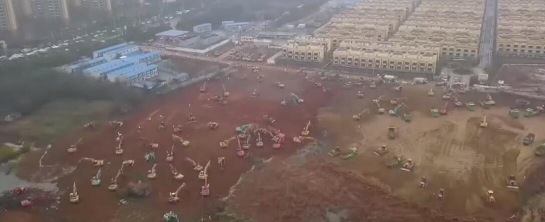 在建的武汉火神山医院